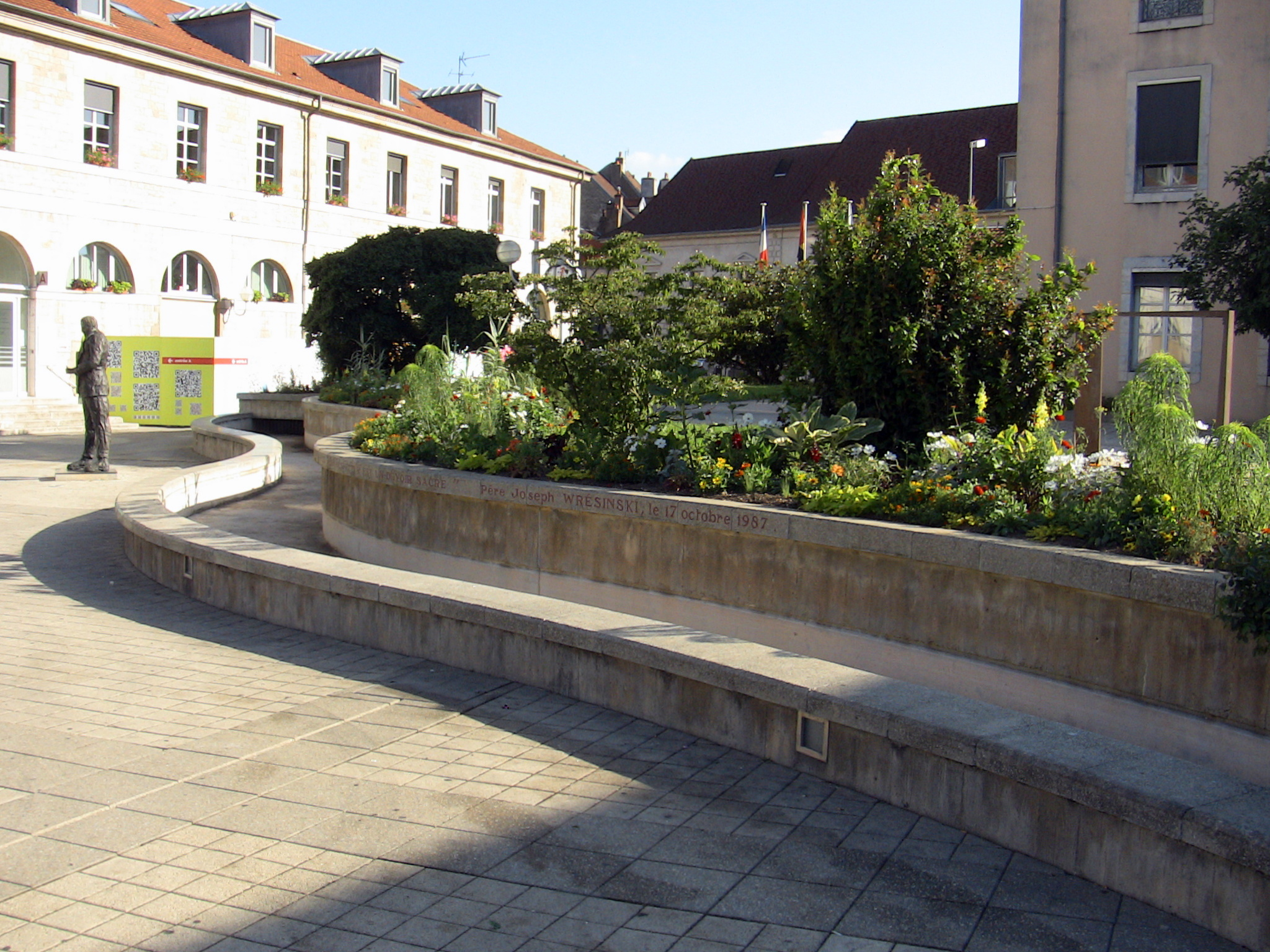 La bassin-fontaine de la Mairie de Besançon.